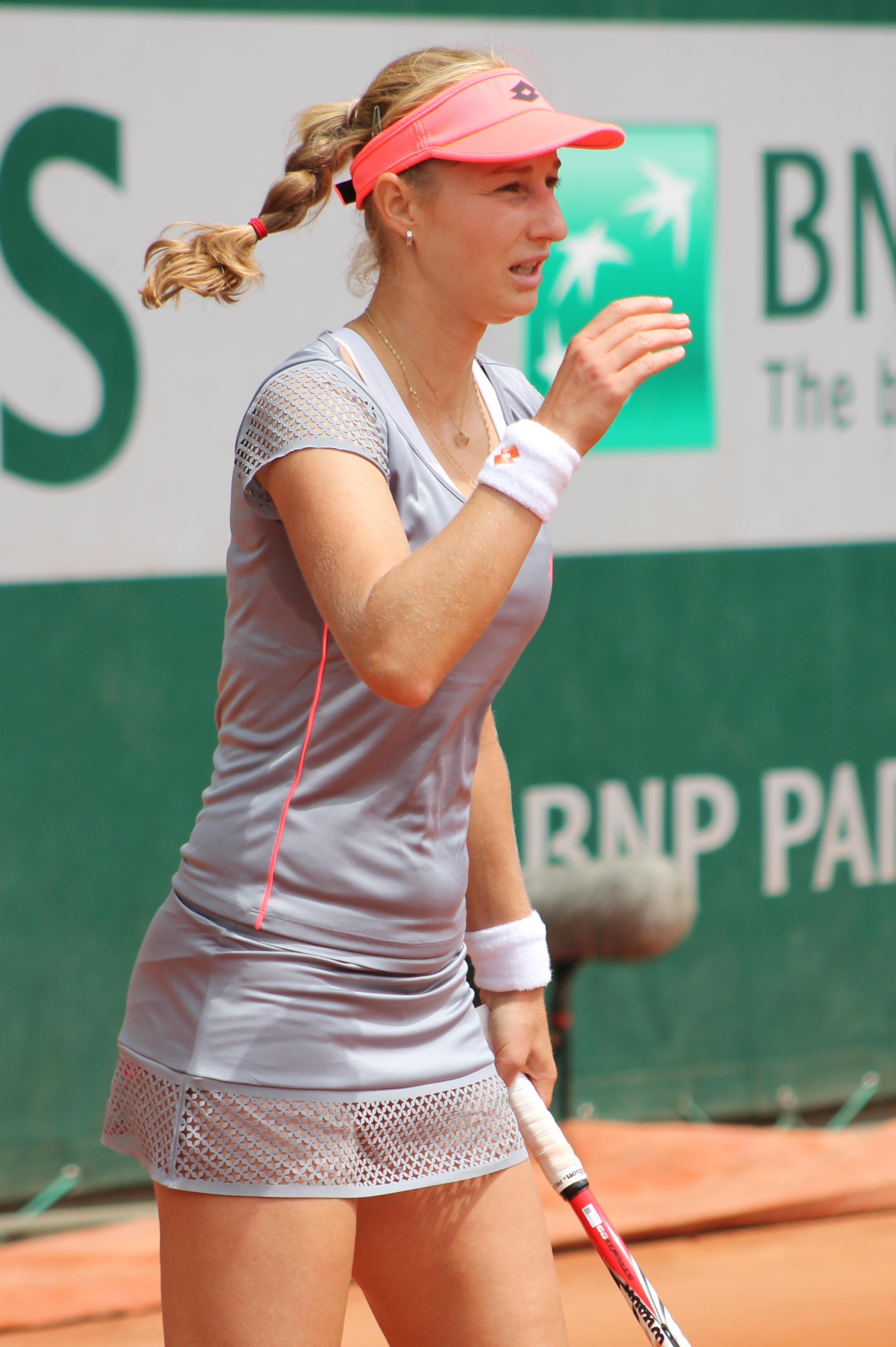 Makarova RG15 (14)